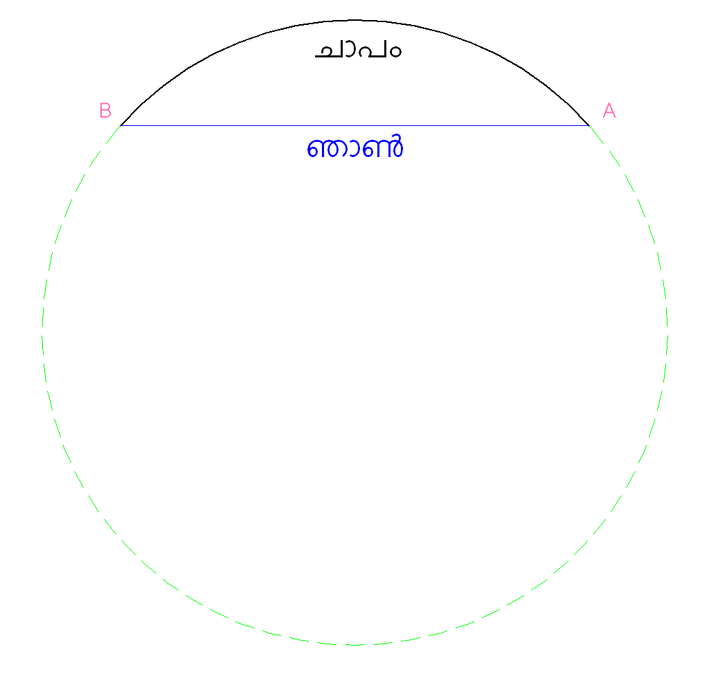 ചാപം, ഞാൺ